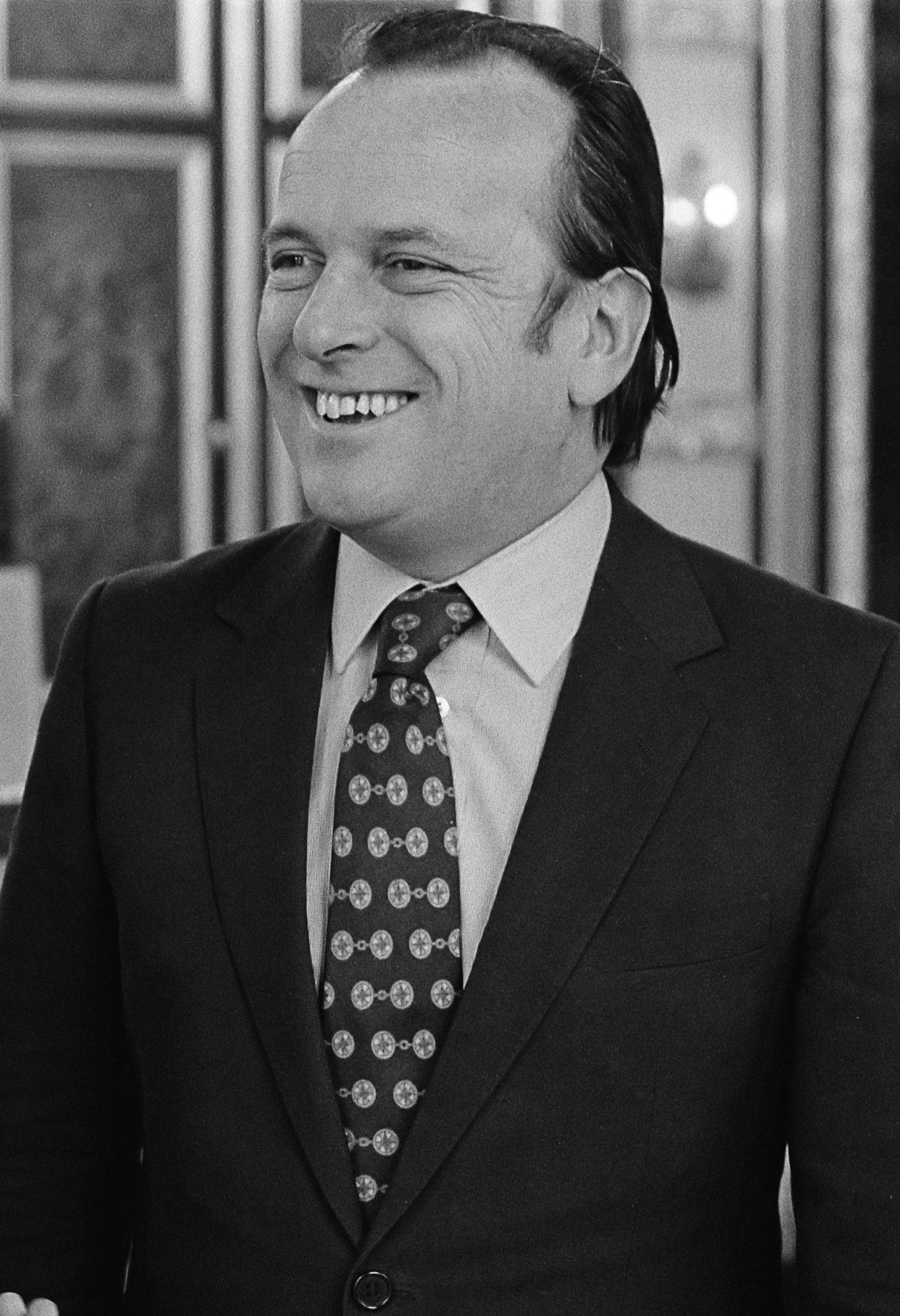 Van Agt ontving Portugese regeringsdelegatie onder leiding van Pinto Balsemao in Den Haag. Van Agt (l.) en Pinto Balsemao 25 februari 1982